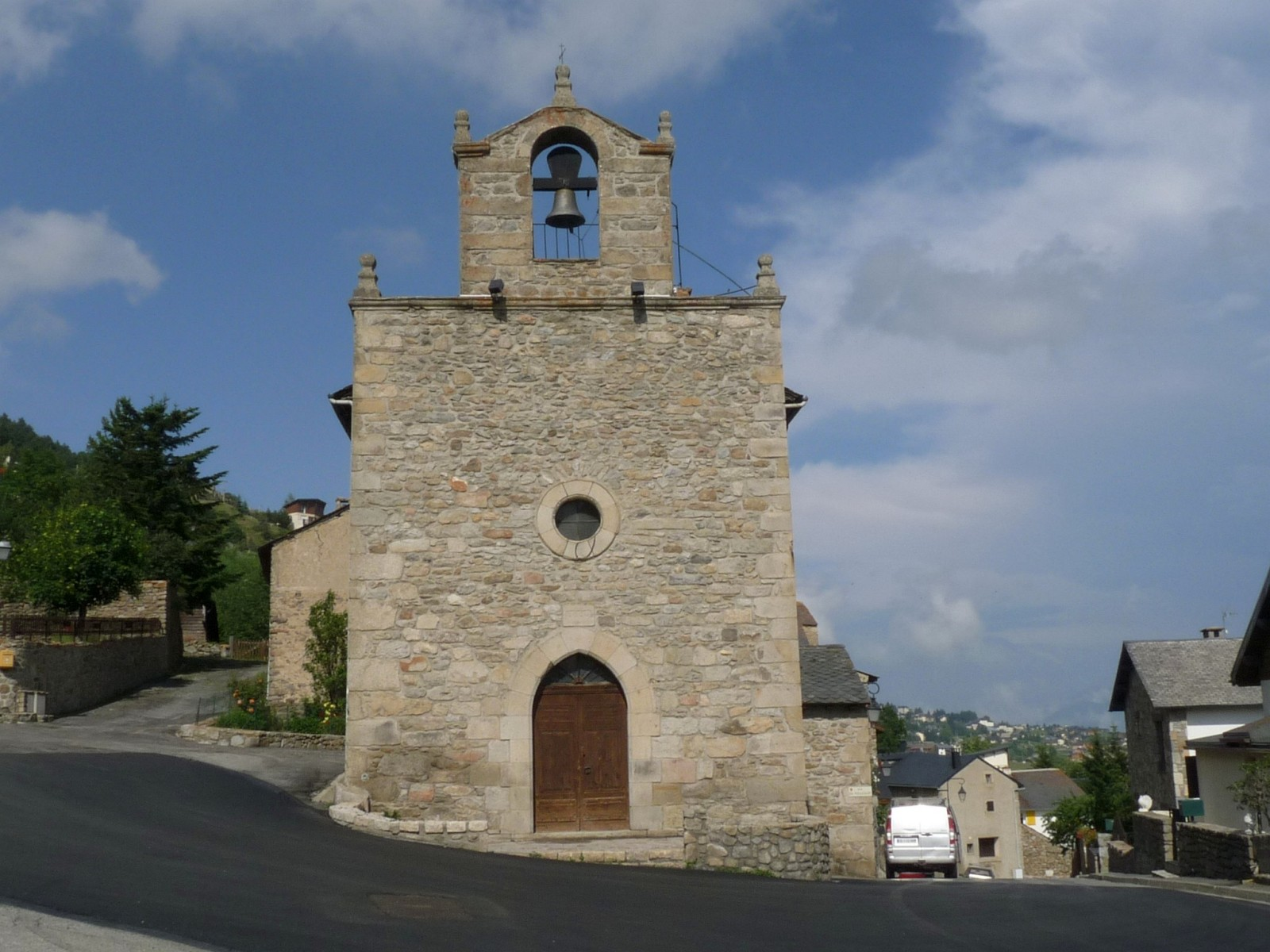 Eglise d'Egat Pyrénées-Orientales, France